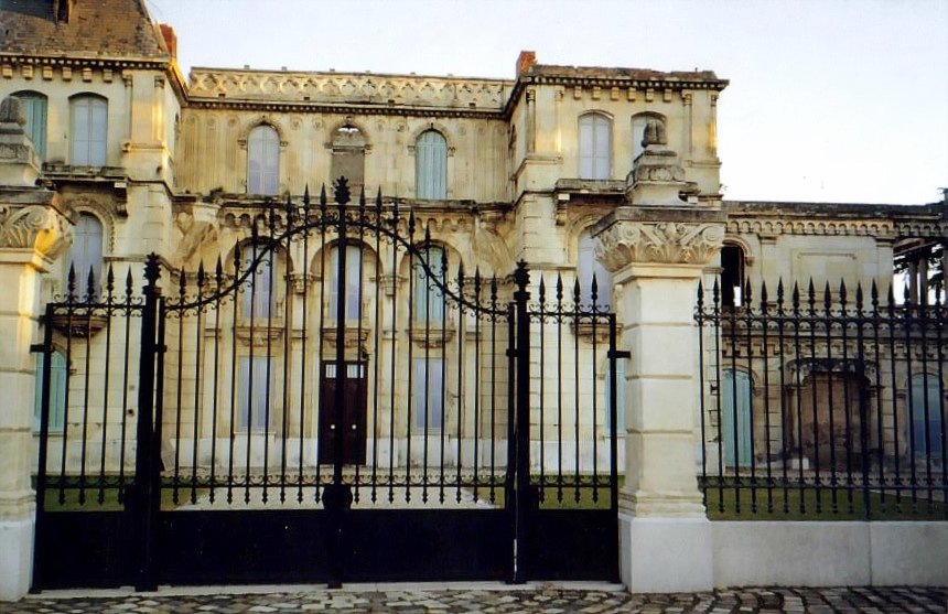 Le château de la Buzine, façade nord, vue partielle